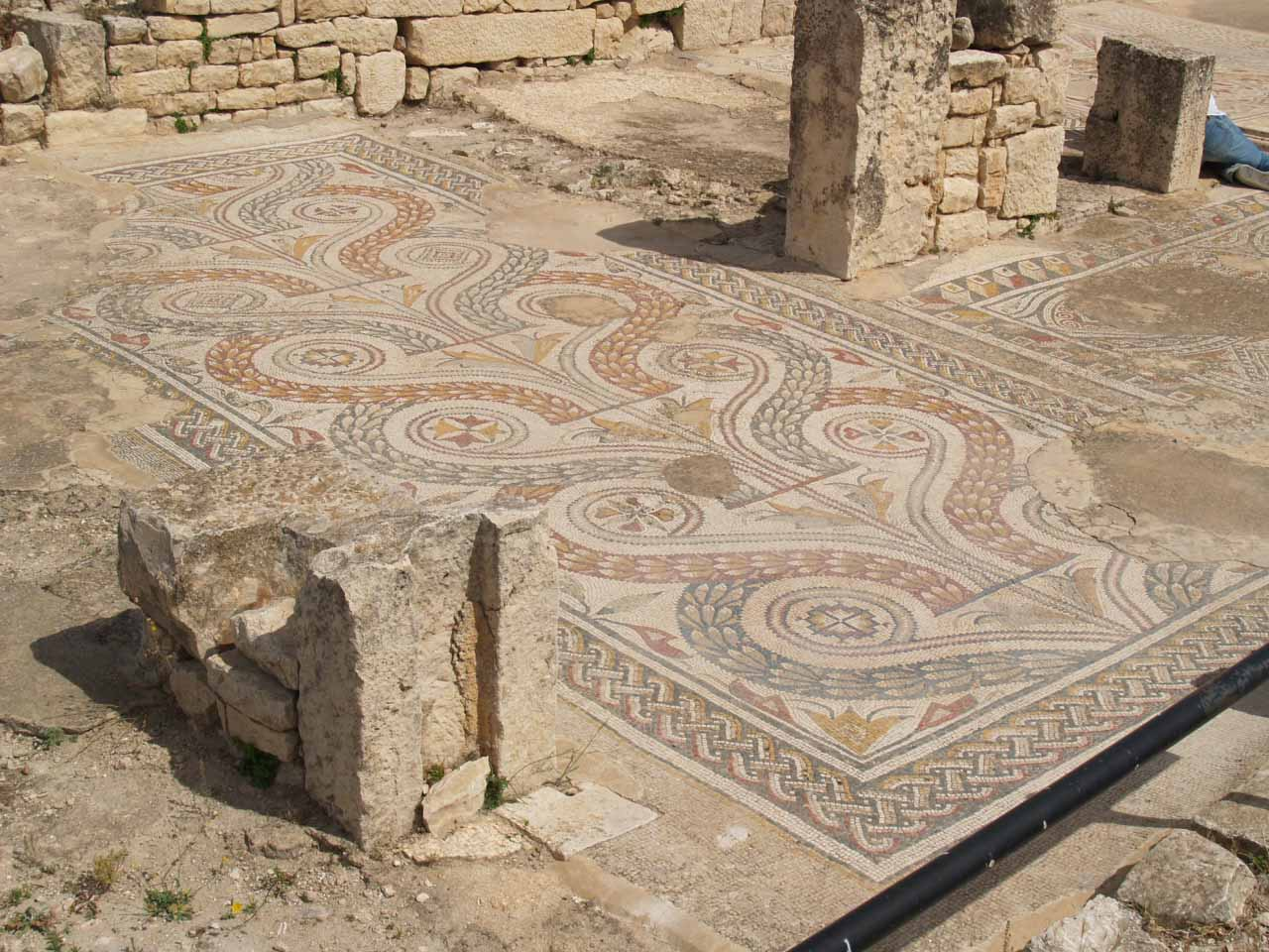 Dougga, pavement de la mosaïque de la maison de Venus